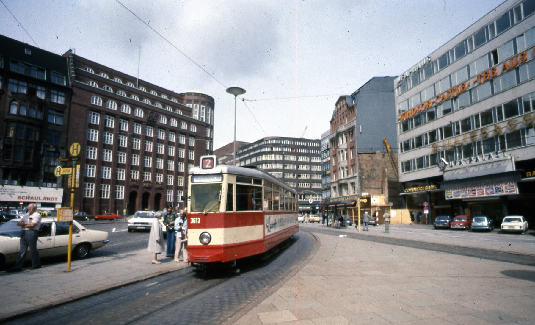 Linie 2 am Gänsemarkt. Links die Finanbehörde, i der Mitte im Hintergrund das Deutschlandhaus und rechts der UFA-Palast.